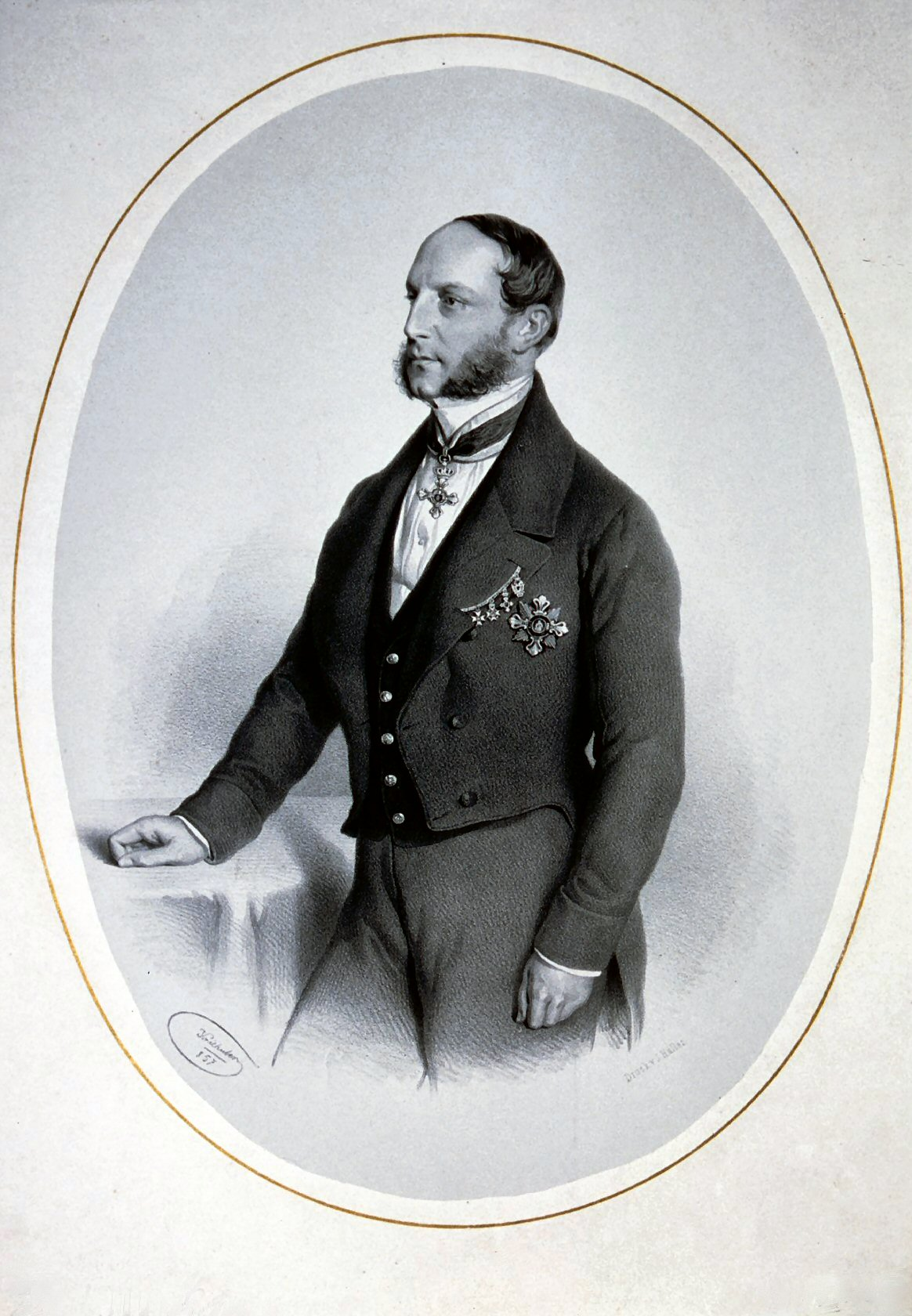 Elio Freiherr von Morpurgo (1805-1876), Industrieller, Bankier, Präsident der Handelskammer und Direktor des Österreichischen Lloyd in Triest. Lithographie von Josef Kriehuber, 1857